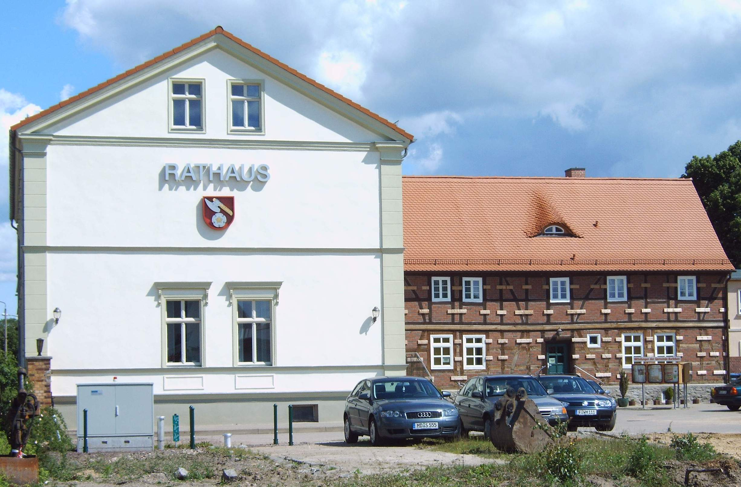 Rathaus von Barleben, Sachsen-Anhalt, Deutschland Bild aufgenommen am 7.6.2006